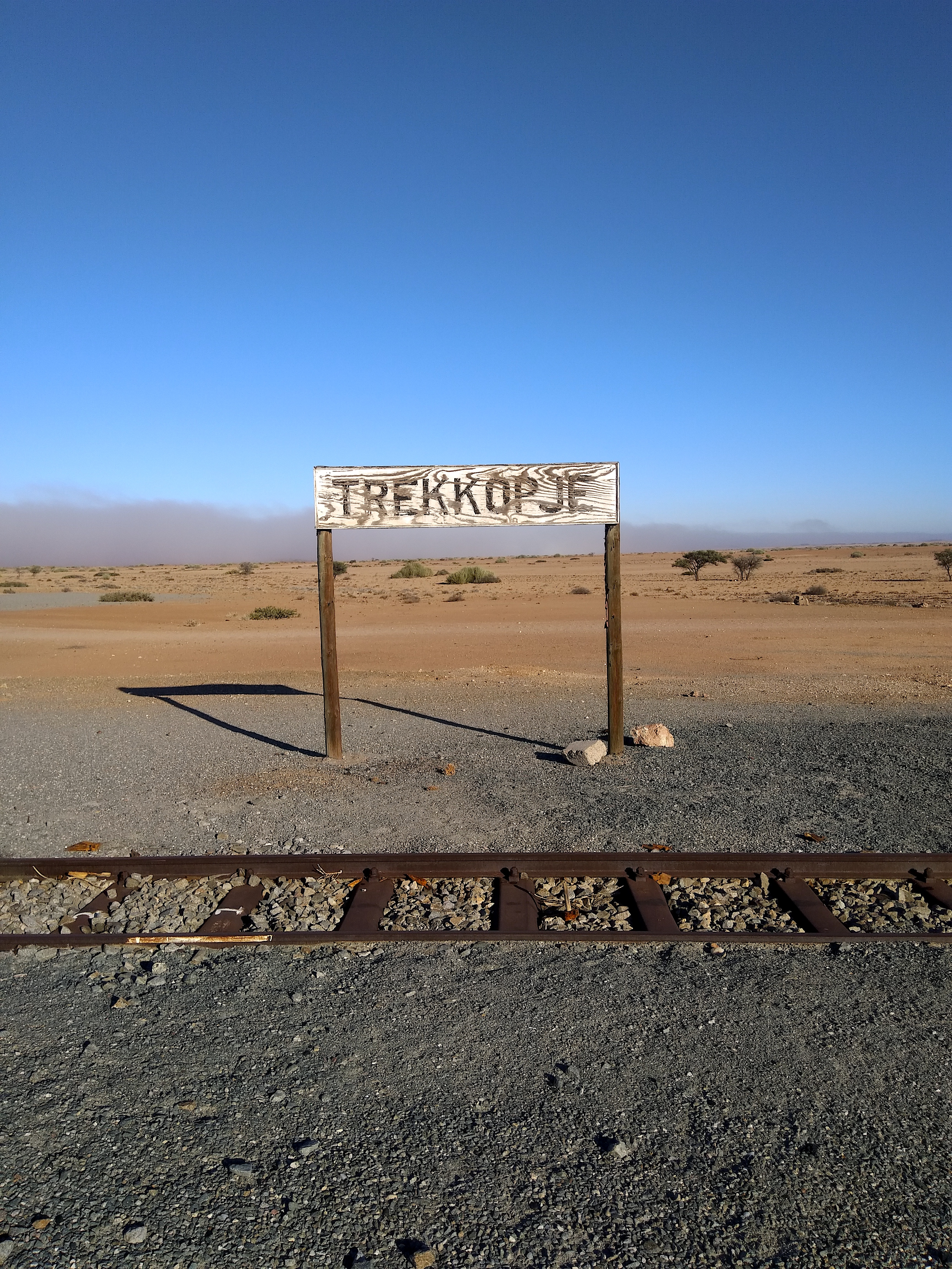 Trekkopje Bahnstation (2018)